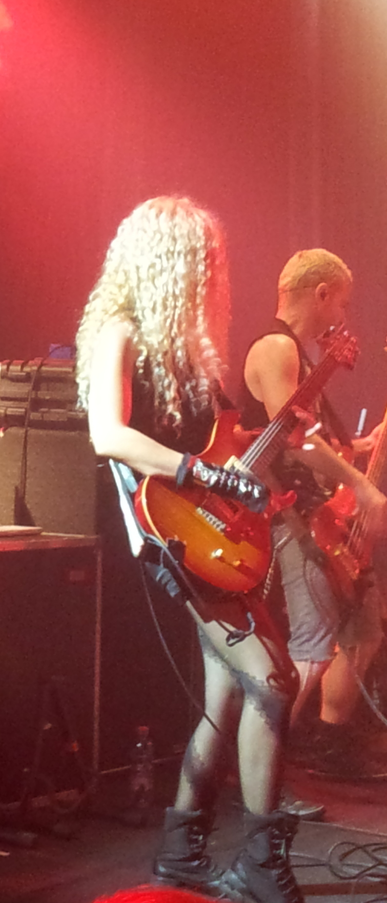 היהודים בהופעה ברדינג 3, 17 בספטמבר 2012